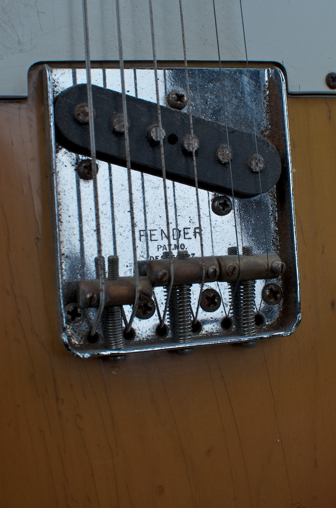 Fender Telecaster (SN5089056, c1973~76) bridge